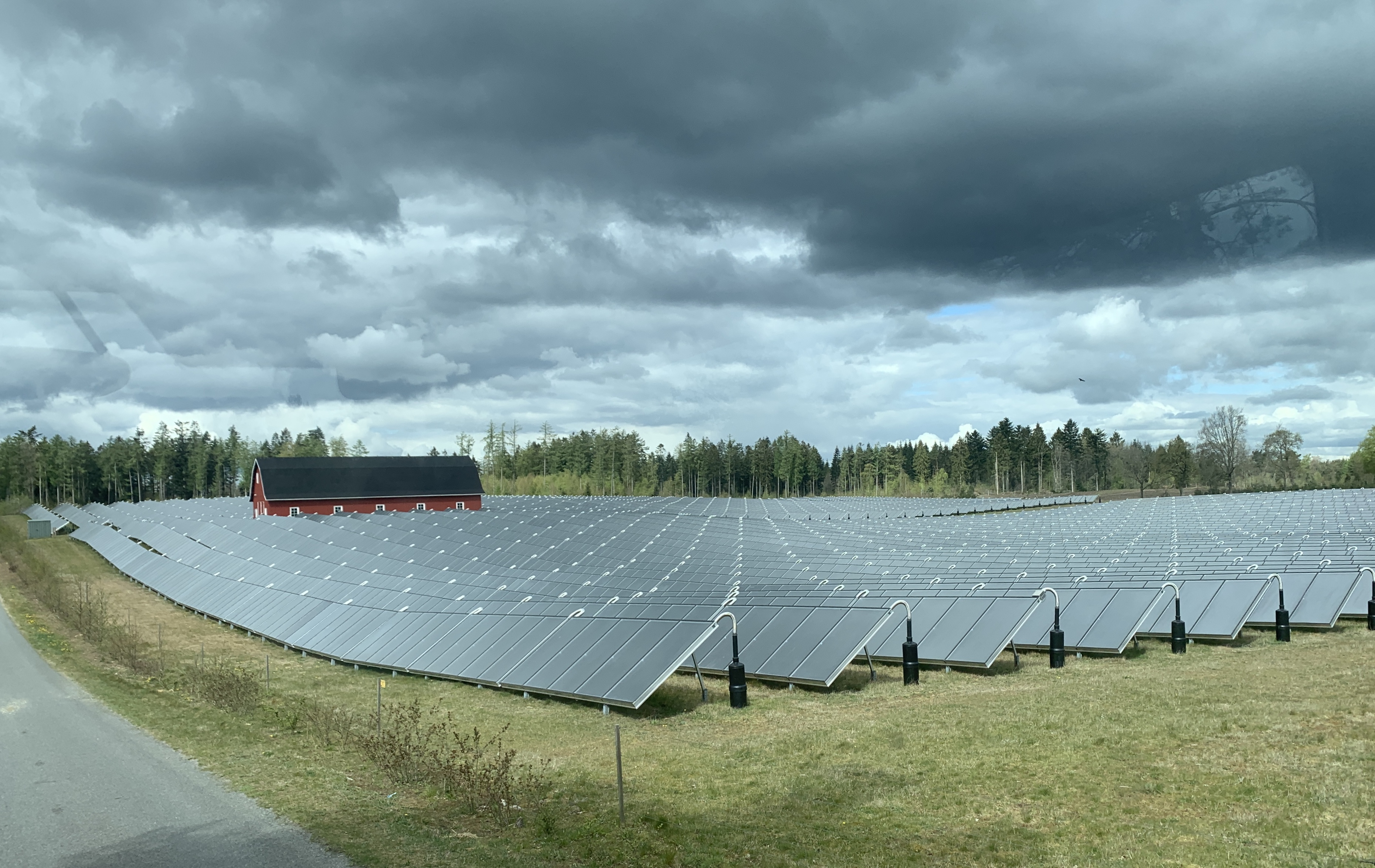 Hadsund Solcelleanlæg på Sandelsmosevej nord for Hadsund.